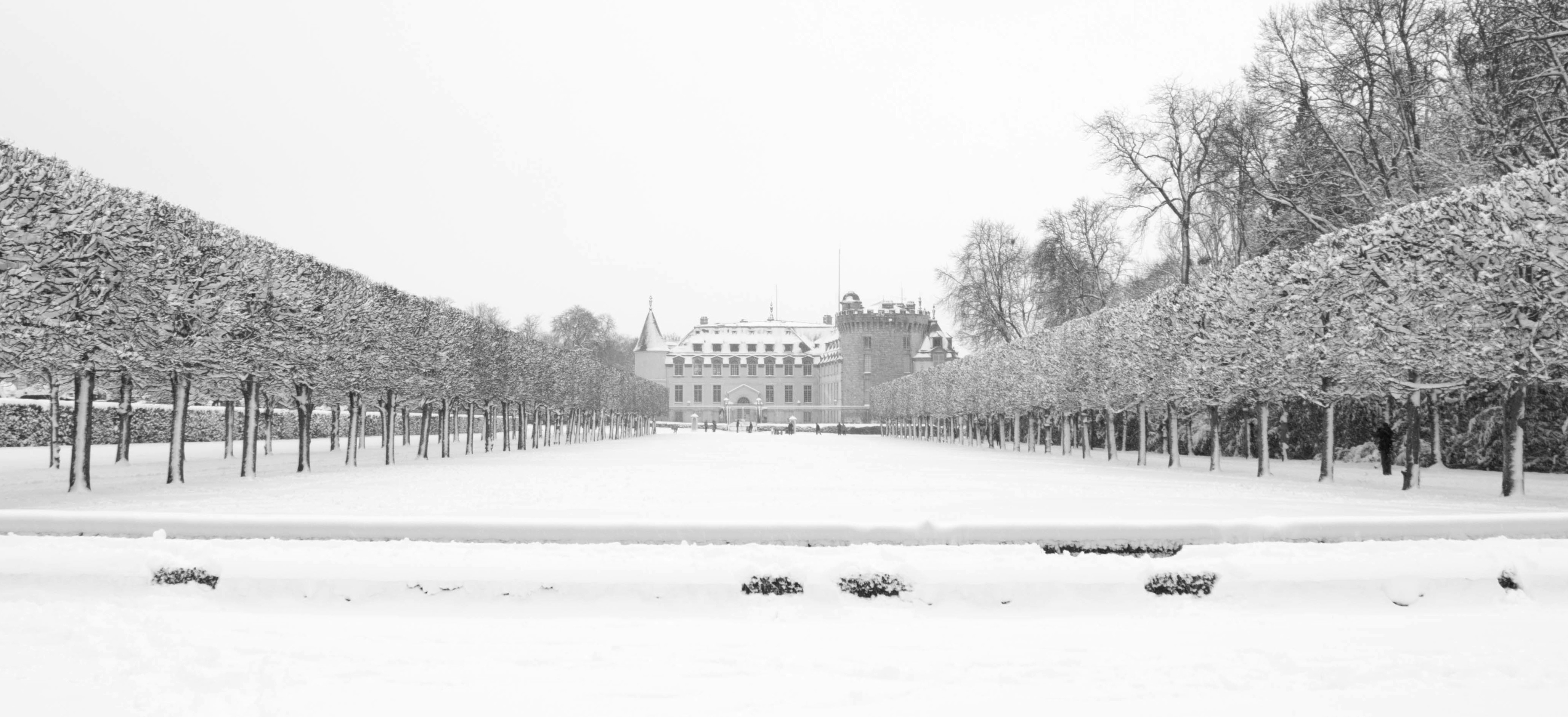 Parc du château de Rambouillet, sous la neige.